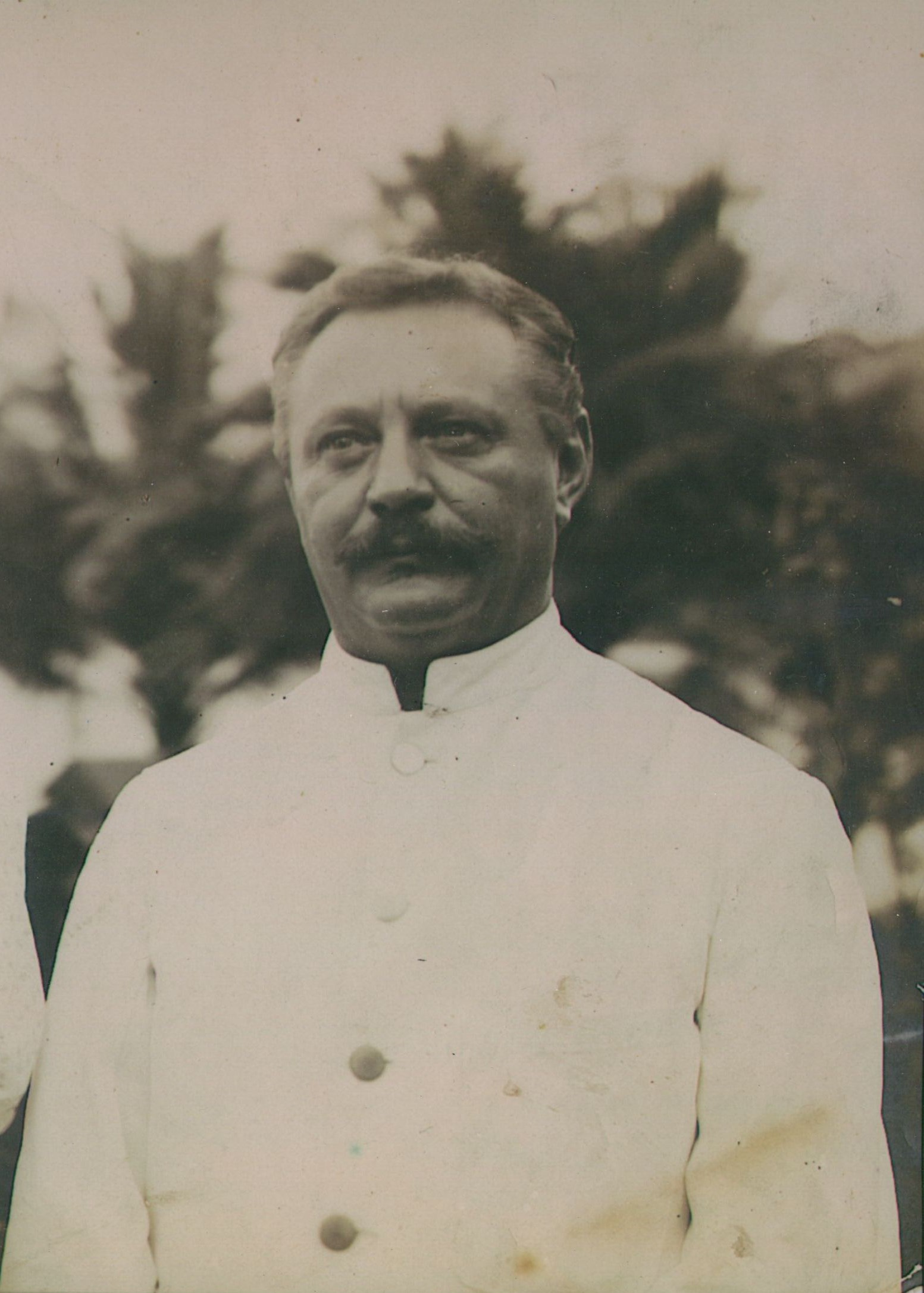 Das Photo zeigt Max Girschner auf der ehemals deutschen Kolonialinsel Ponape/Karolinen.